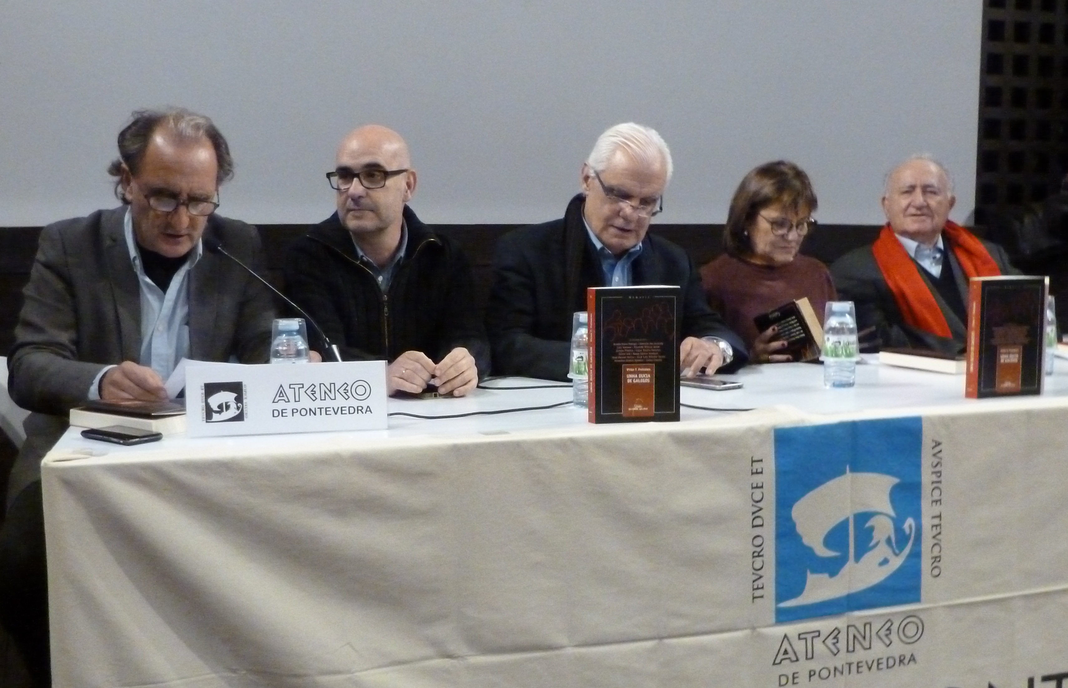 Xaime Toxo, Francisco Castro, Víctor Freixanes, Fina Casalderrey, Xesús Alonso Montero